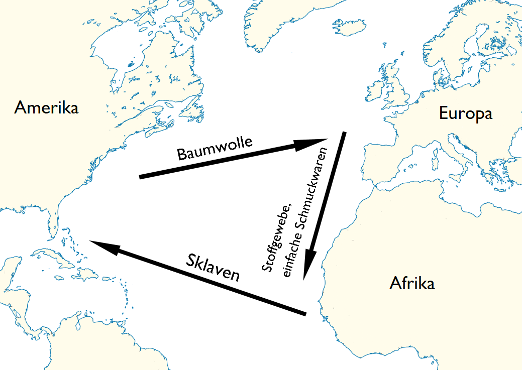 Darstellung des Dreieckshandels zwischen Afrika, Amerika und Europa